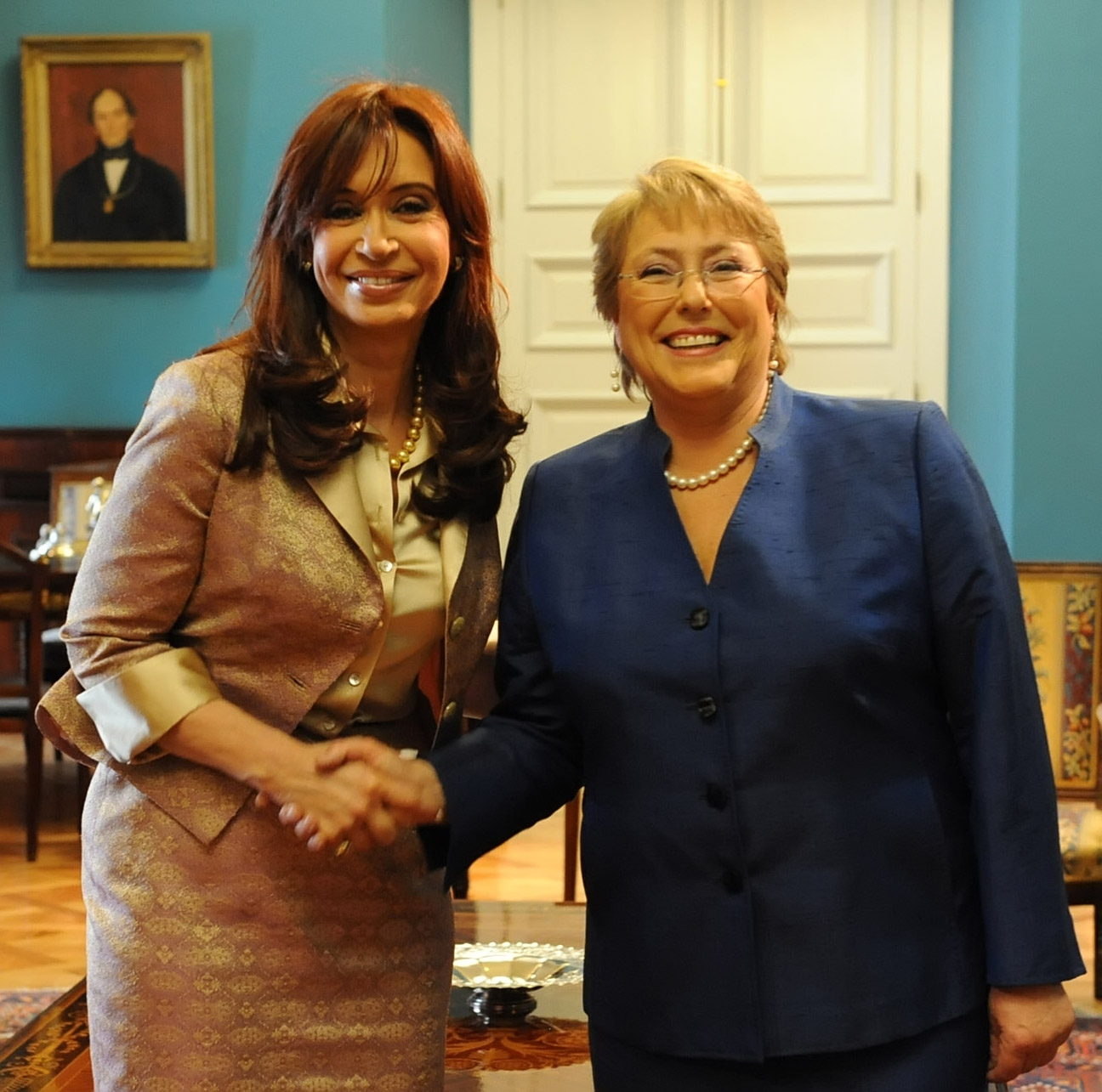 Las presidentas de Chile y Argentina, en el Palacio de la Moneda, en Santiago. Santiago de Chile, 29 de octubre de 2009.